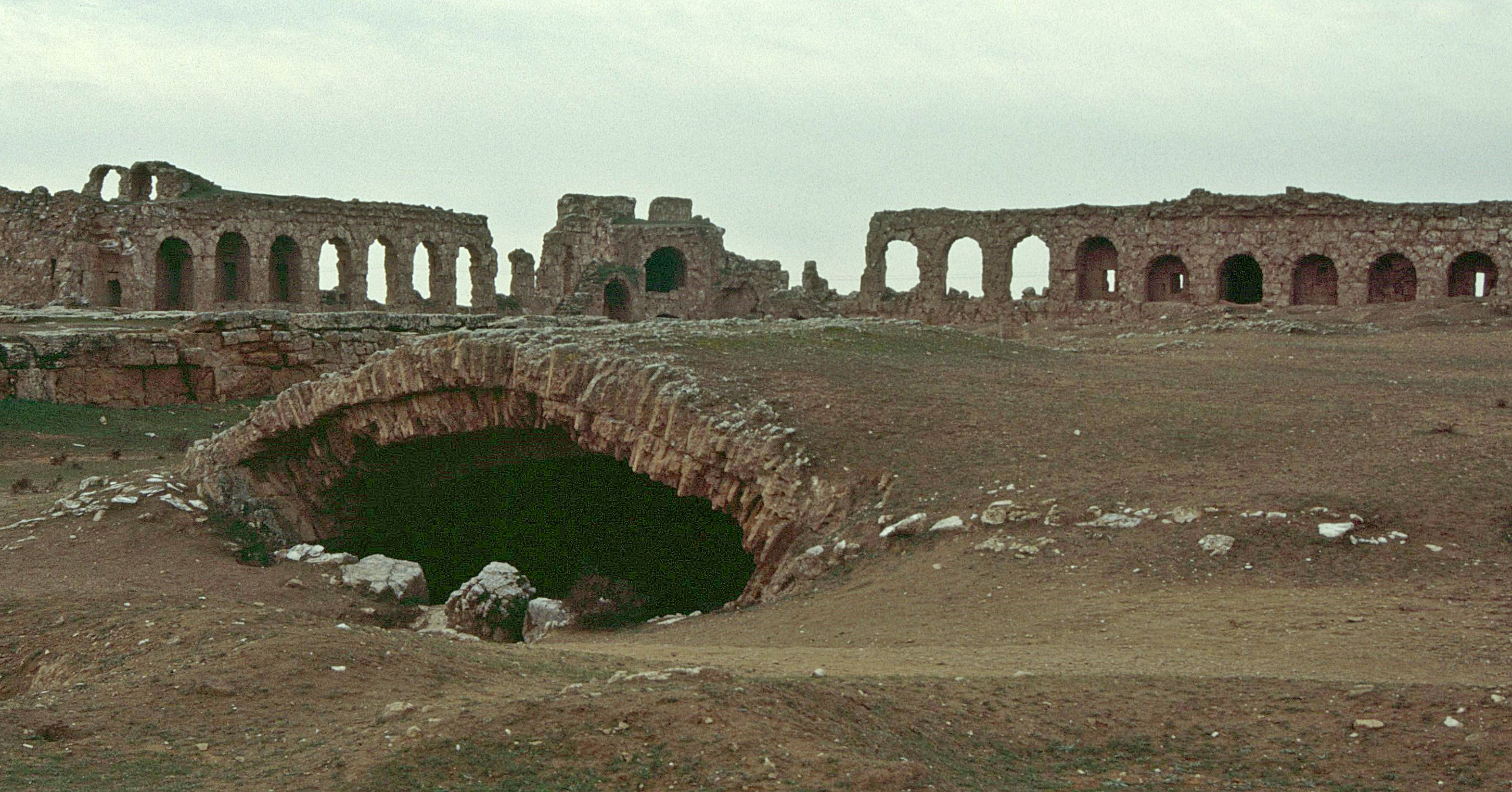 Resafa: Stadtmauer und Zisternen